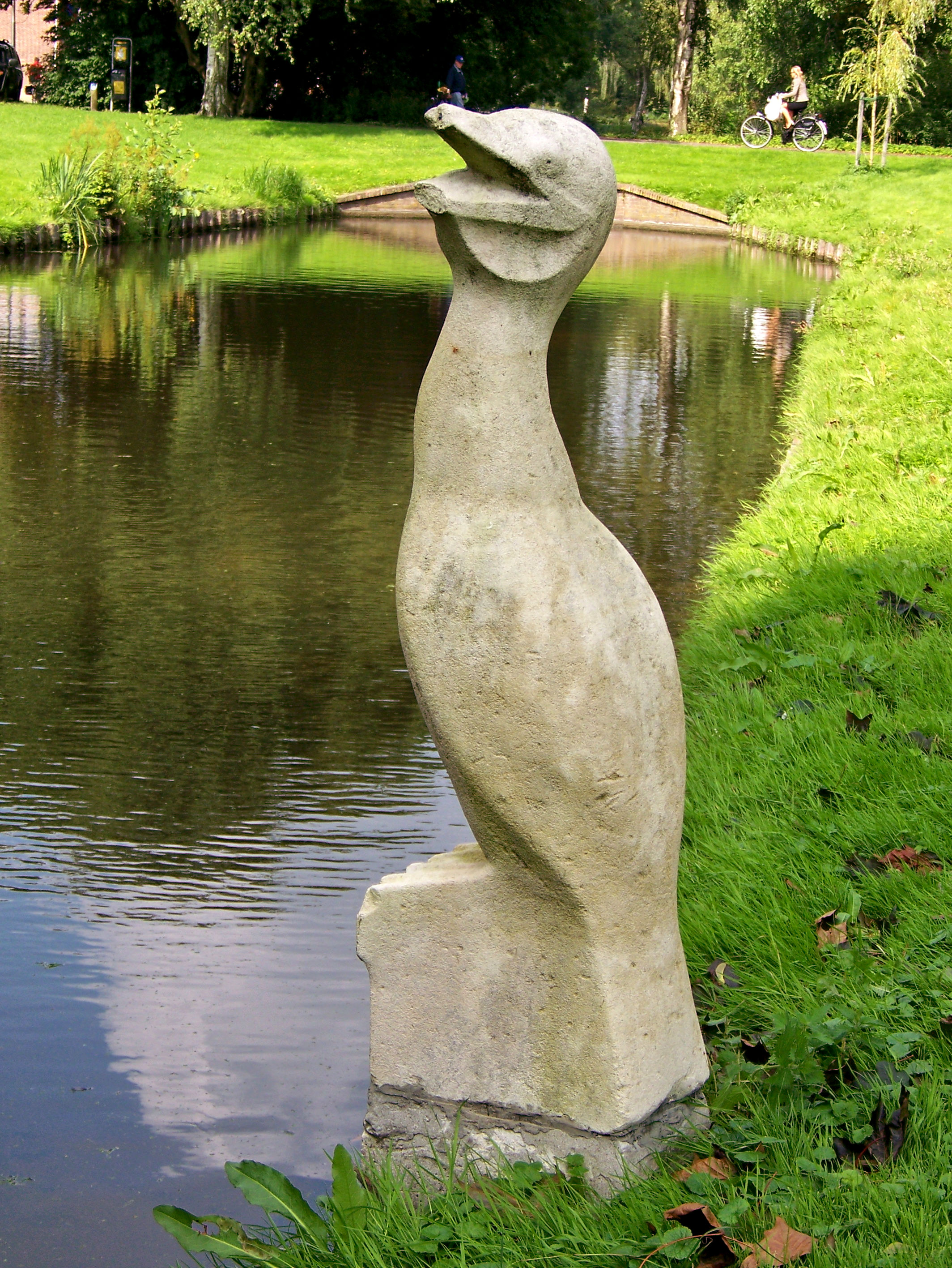 Aalscholver van Theo Bennes in Amstelveen